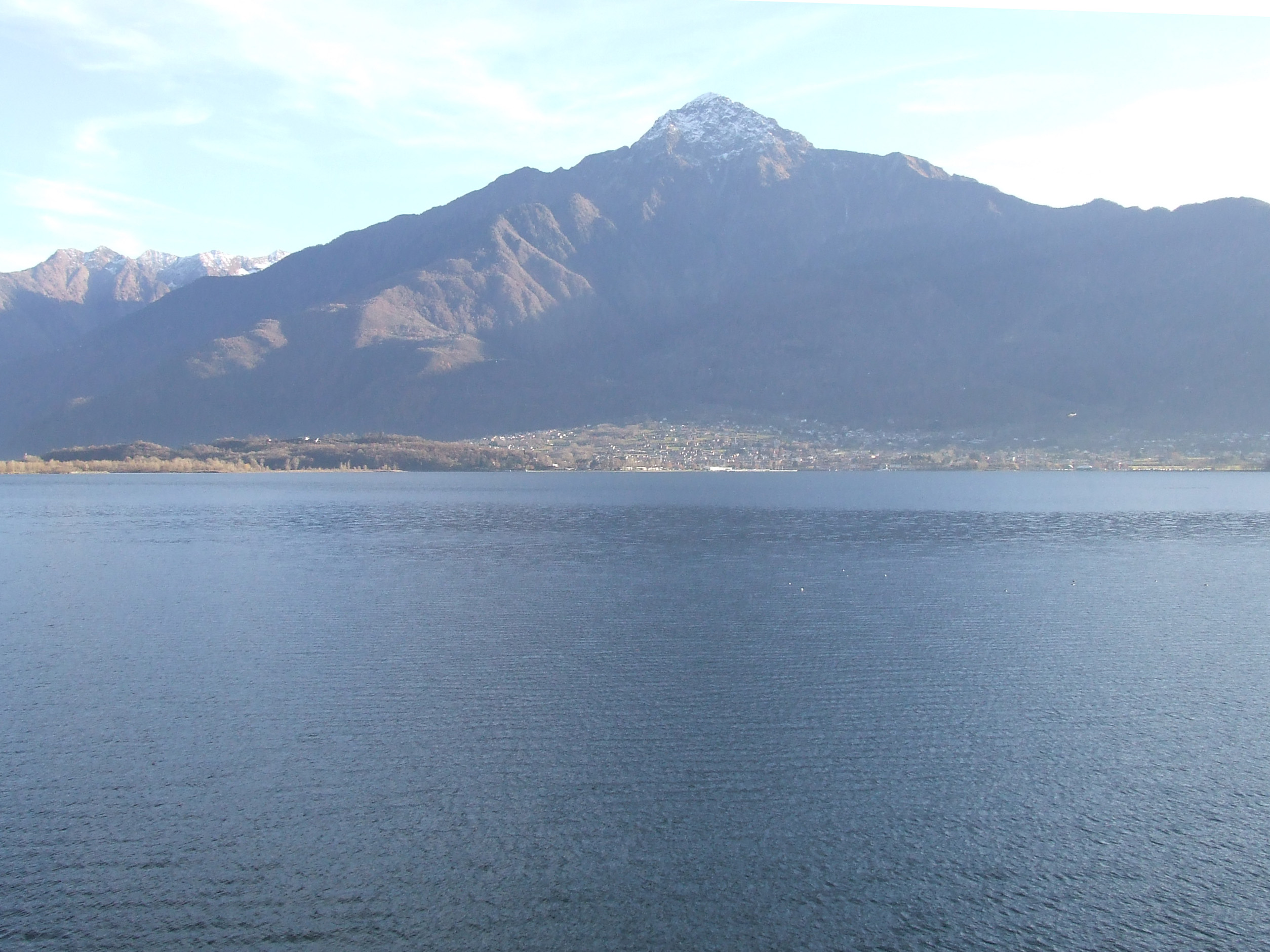 visto dalla sponda opposta del lago